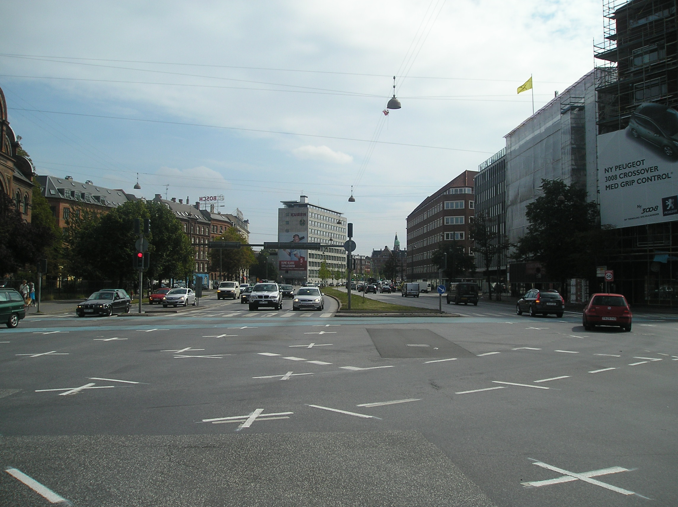 The street Gyldenløvesgade in Copenhagen.